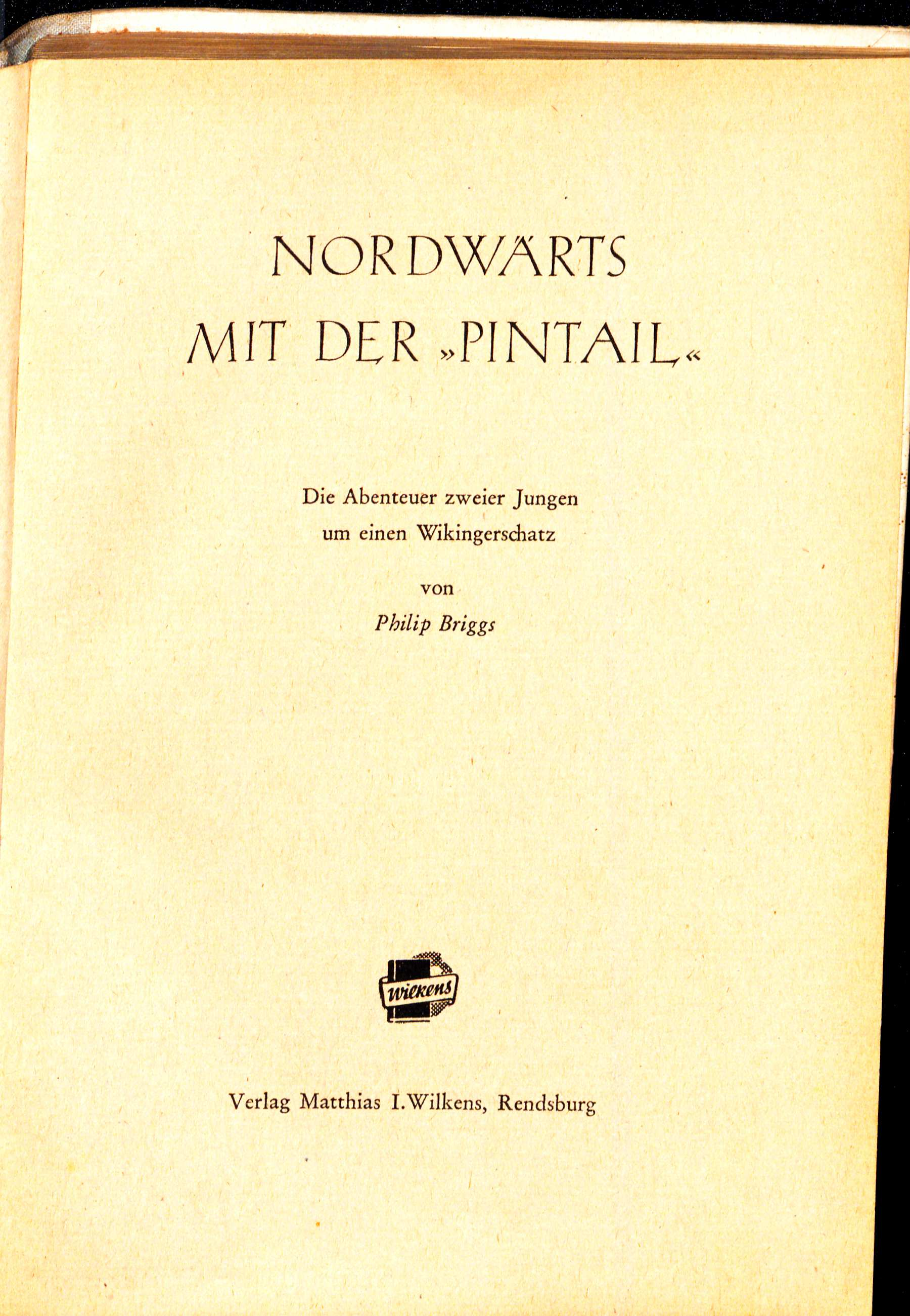 Philip Briggs (i.e. the british writer Phyllis Briggs) Nordwärts mit der "Pintail" 1948 Titel